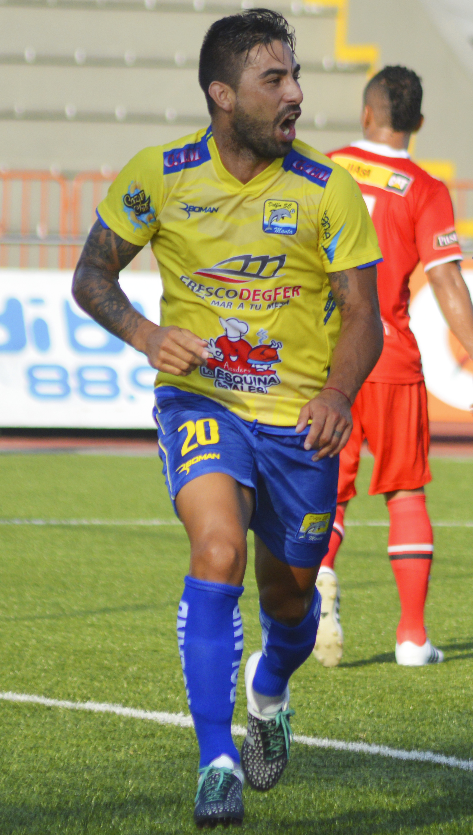 Maxi Barreiro jugando para el Delfín de Ecuador en el 2016